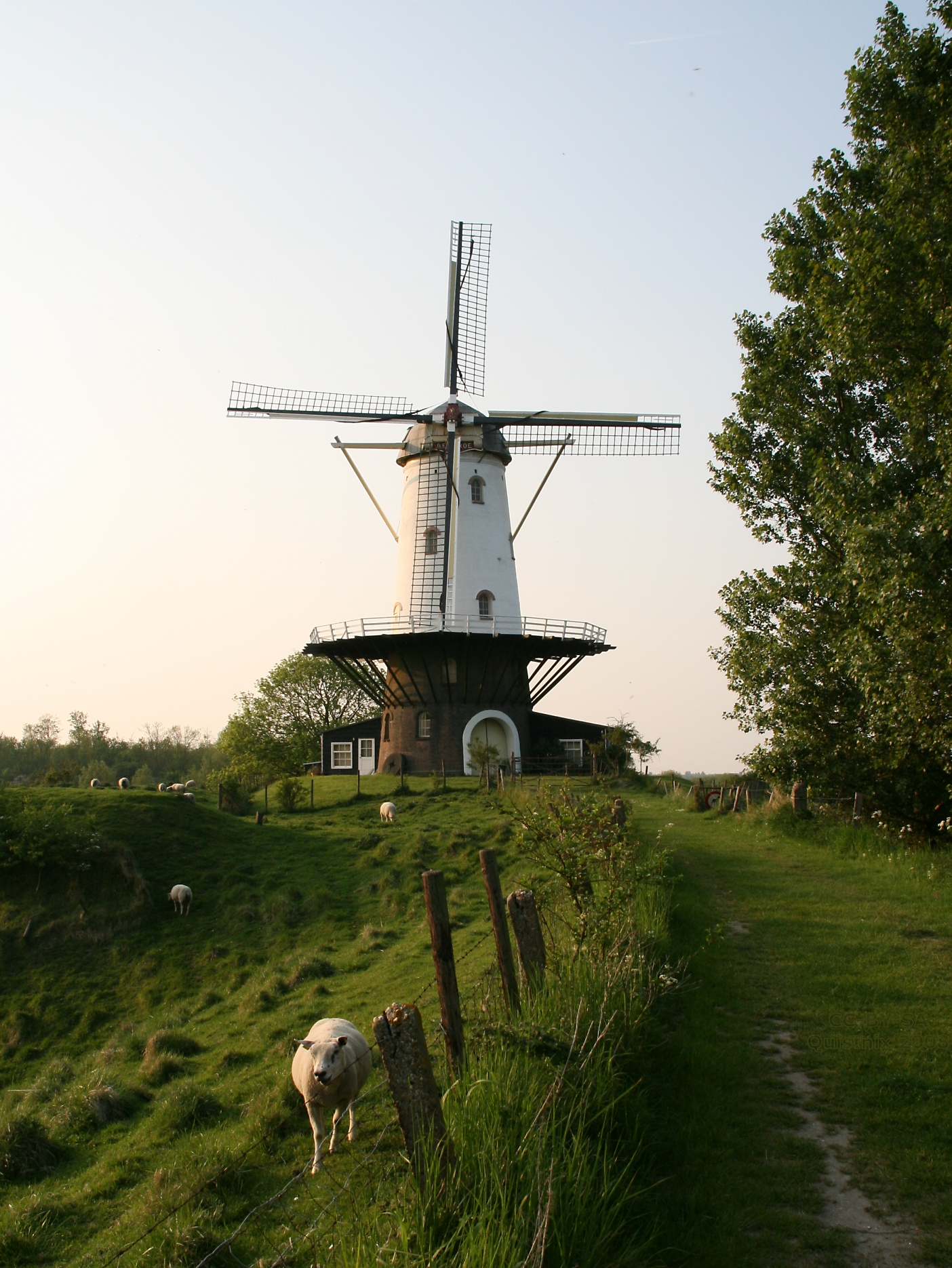 Veere: Korenmolen De Koe, met op de voorgrond schapen